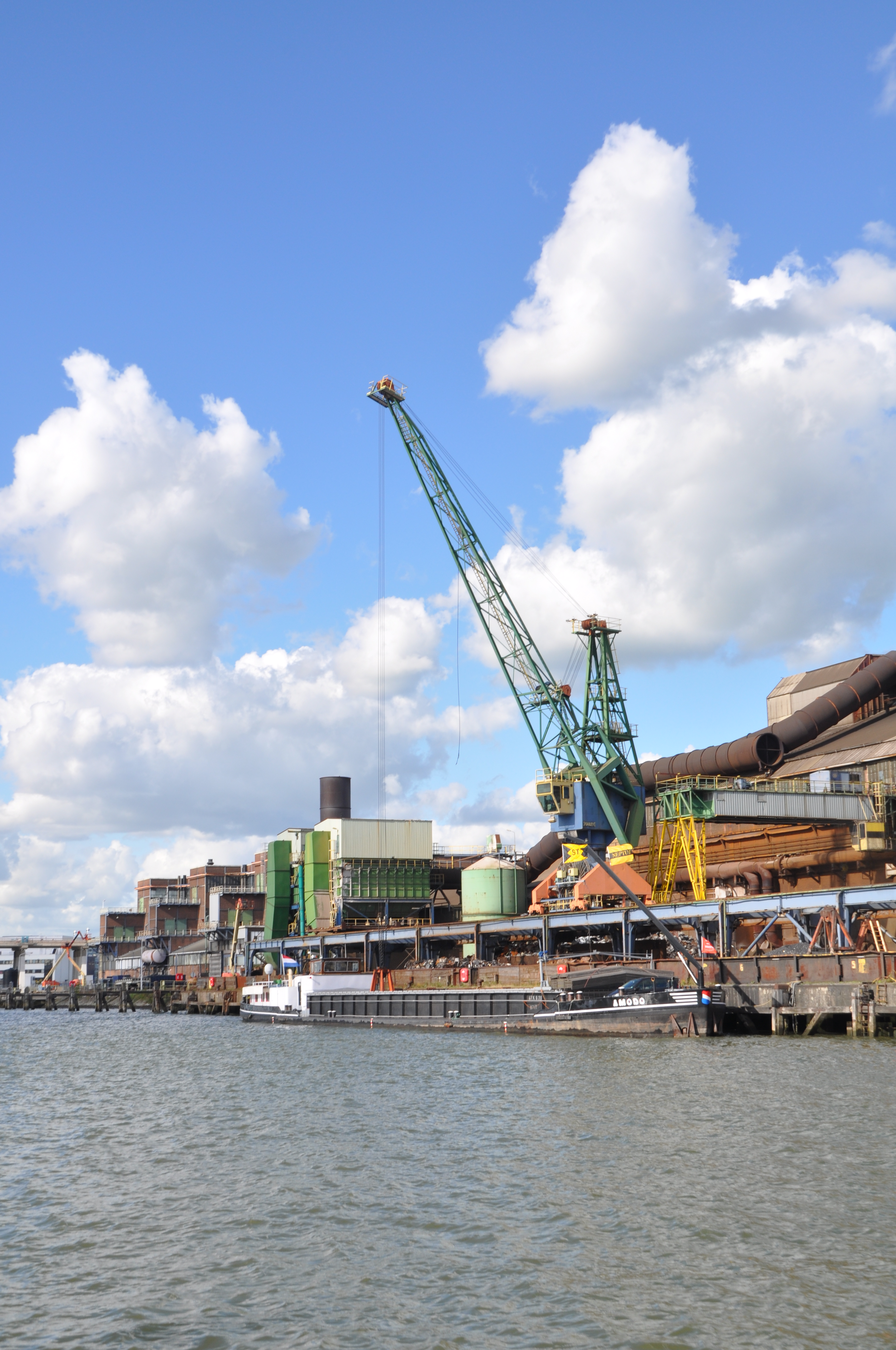 De AMODO aan het lossen bij de kabelfabriek in Alblasserdam